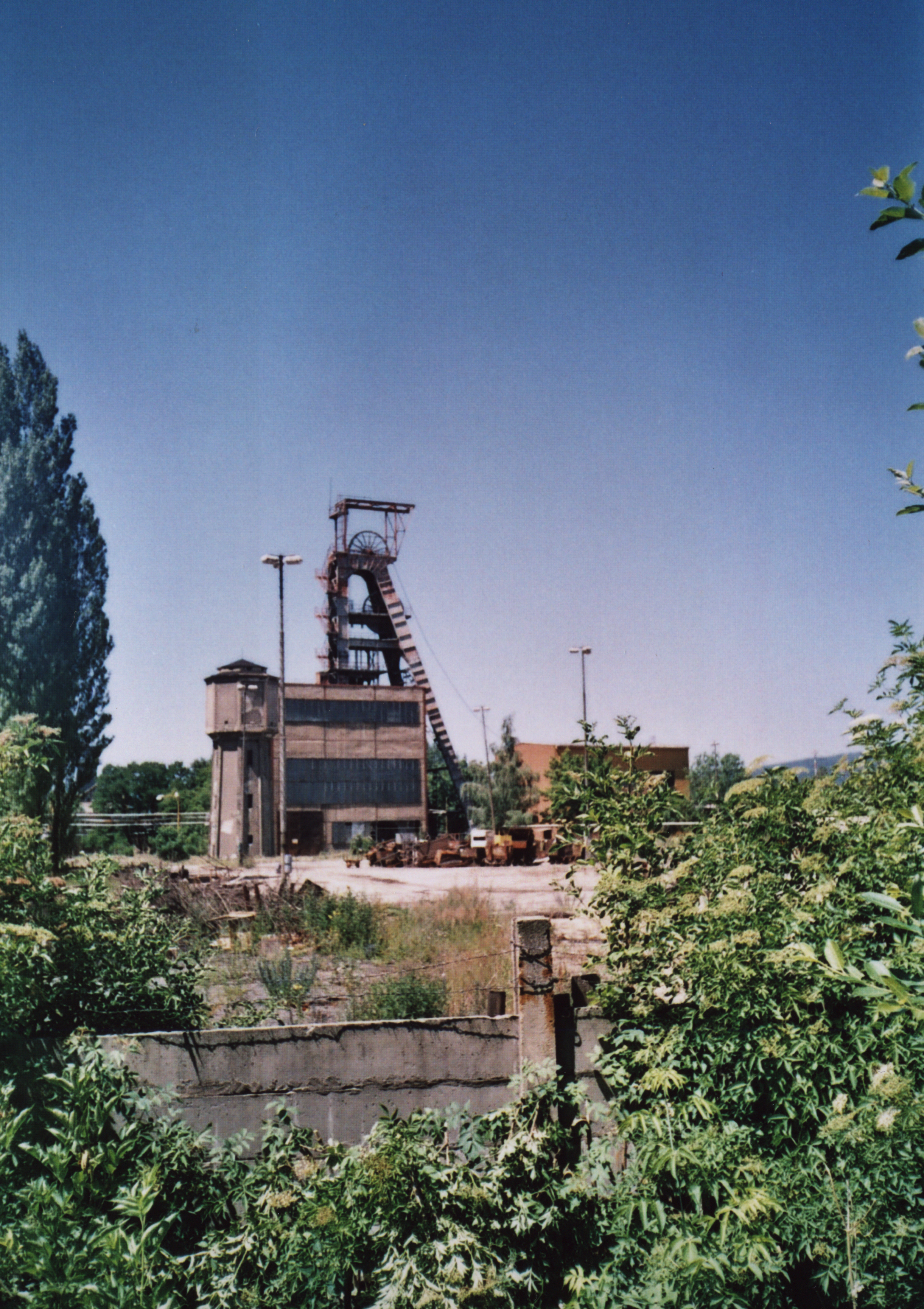 Hlubinný uhelný důl hlubinný KOHINOOR II (Mariánské Radčice), Mariánské Radčice (skenováno z negativu)